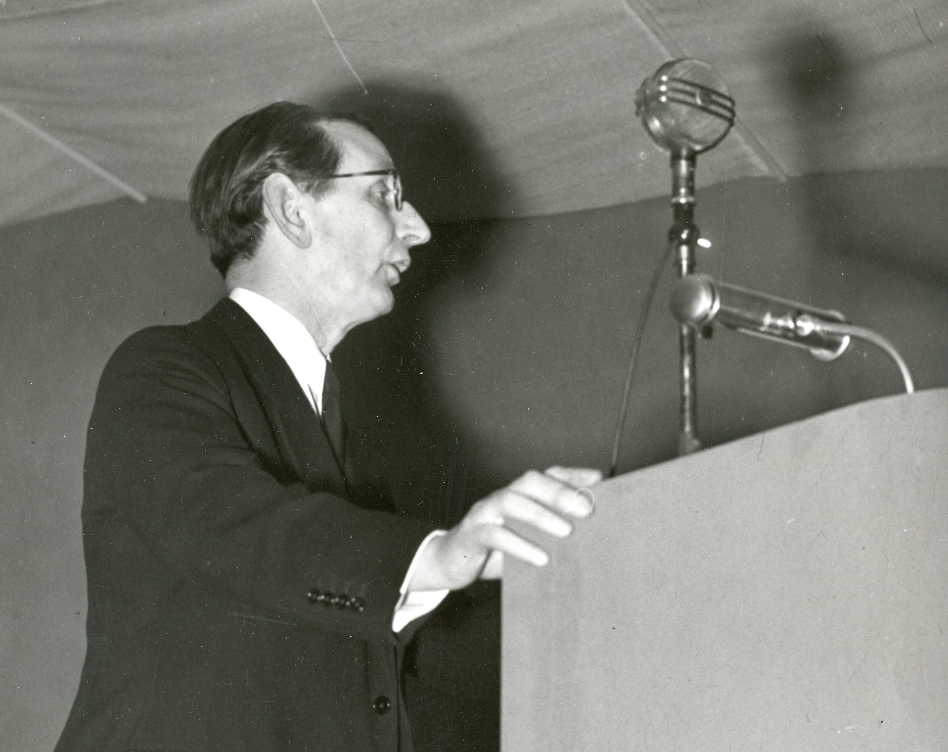 Norsk utstilling I Stockholm. Den 10. mars i år (1943) ble det åpnet en norsk utstilling i Stockholm i nærvær av prinsesse Ingeborg, prins Eugen, utenriksminister Günther, den norske sendemann Jens Bull og sendemenn for de allierte nasjoner. En rekke representanter for den svenske hovedstad var også til stede ved innvielsen. Utstillingslokalene befinner seg i Thulehuset i Sveavegen. Den høytidelige åpning ble foretatt av prins Eugen. Formann i svensk-norsk forening, borgarrådet Ynge Larsson taler ved åpningen av norgesutstillingen i Stockholm 10. mars 1943. RA/PA-1209/Uc/66/4/S 339